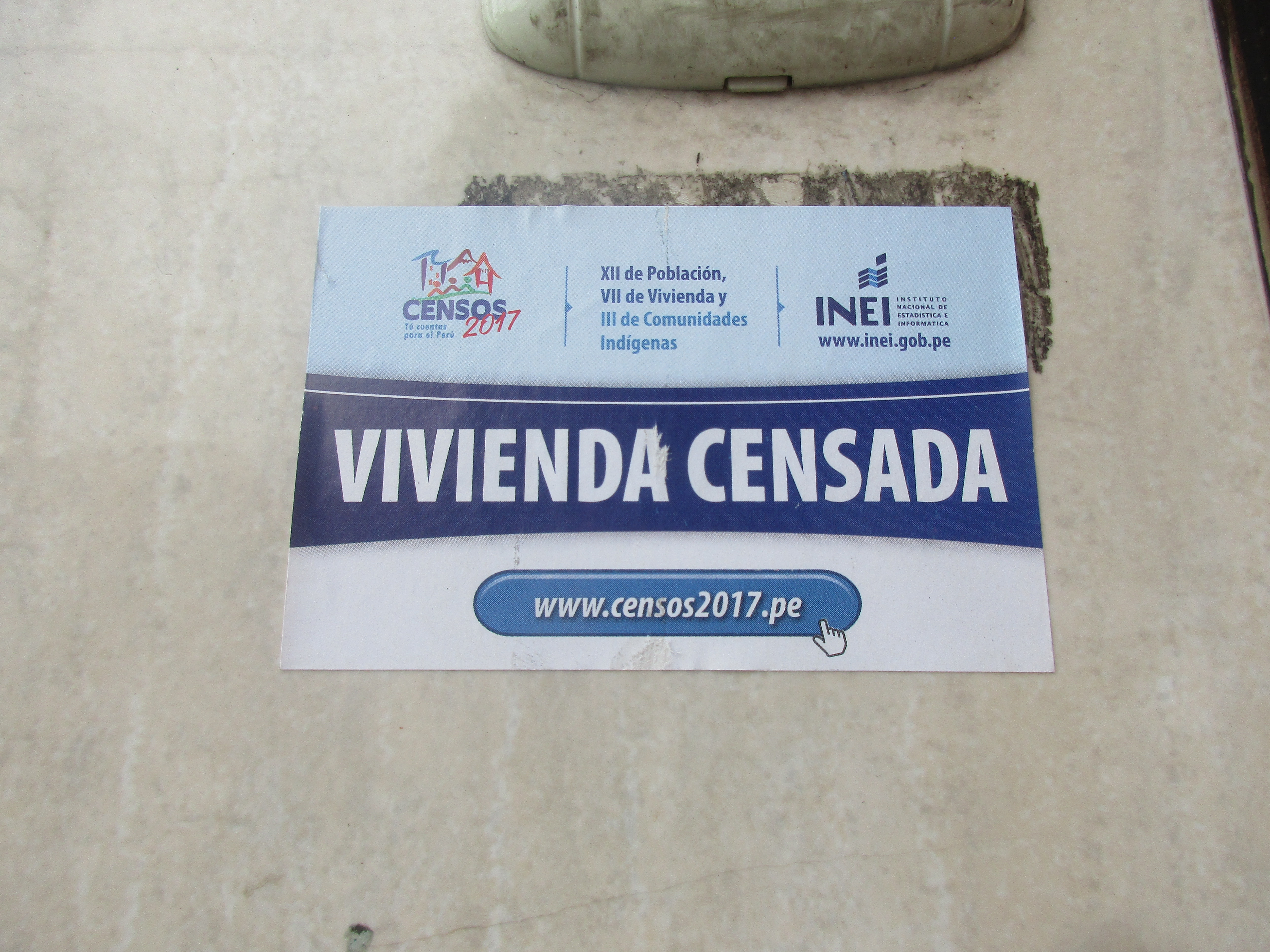 Etiqueta de un hogar ya censado en el Censo peruano de 2017